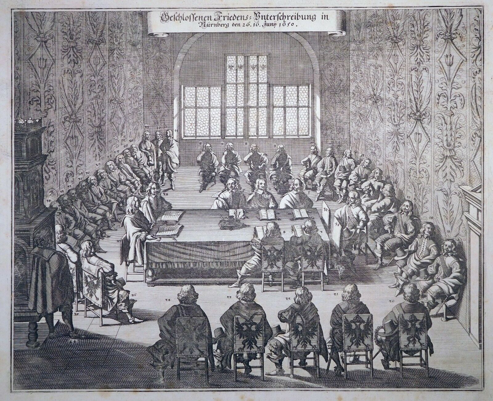 Radierung, Nürnberger Exekutionstag 1650, Unterzeichnung am 26. Juli 1650, Merians Erben, 1652, Theatrum Europeum